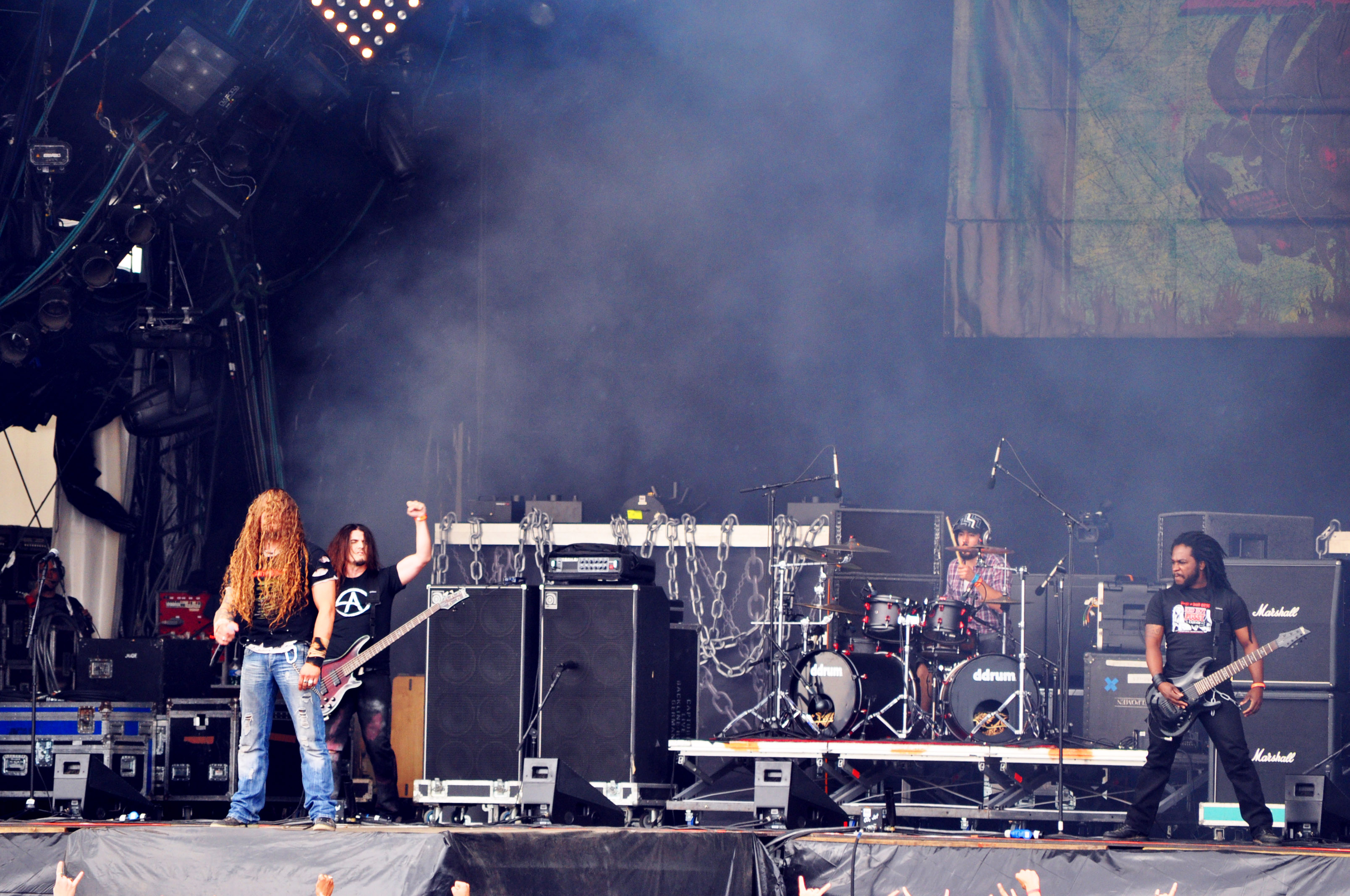 Zuul FX au Hellfest 2011